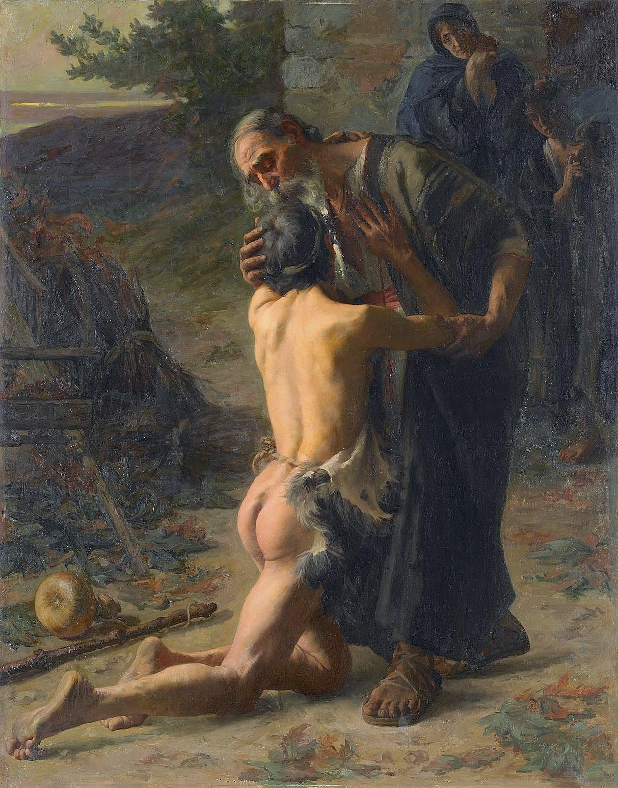 Le retour de l'enfant prodigue